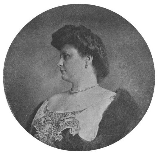 Софья Александровна Стремоухова, ур. Салтыкова